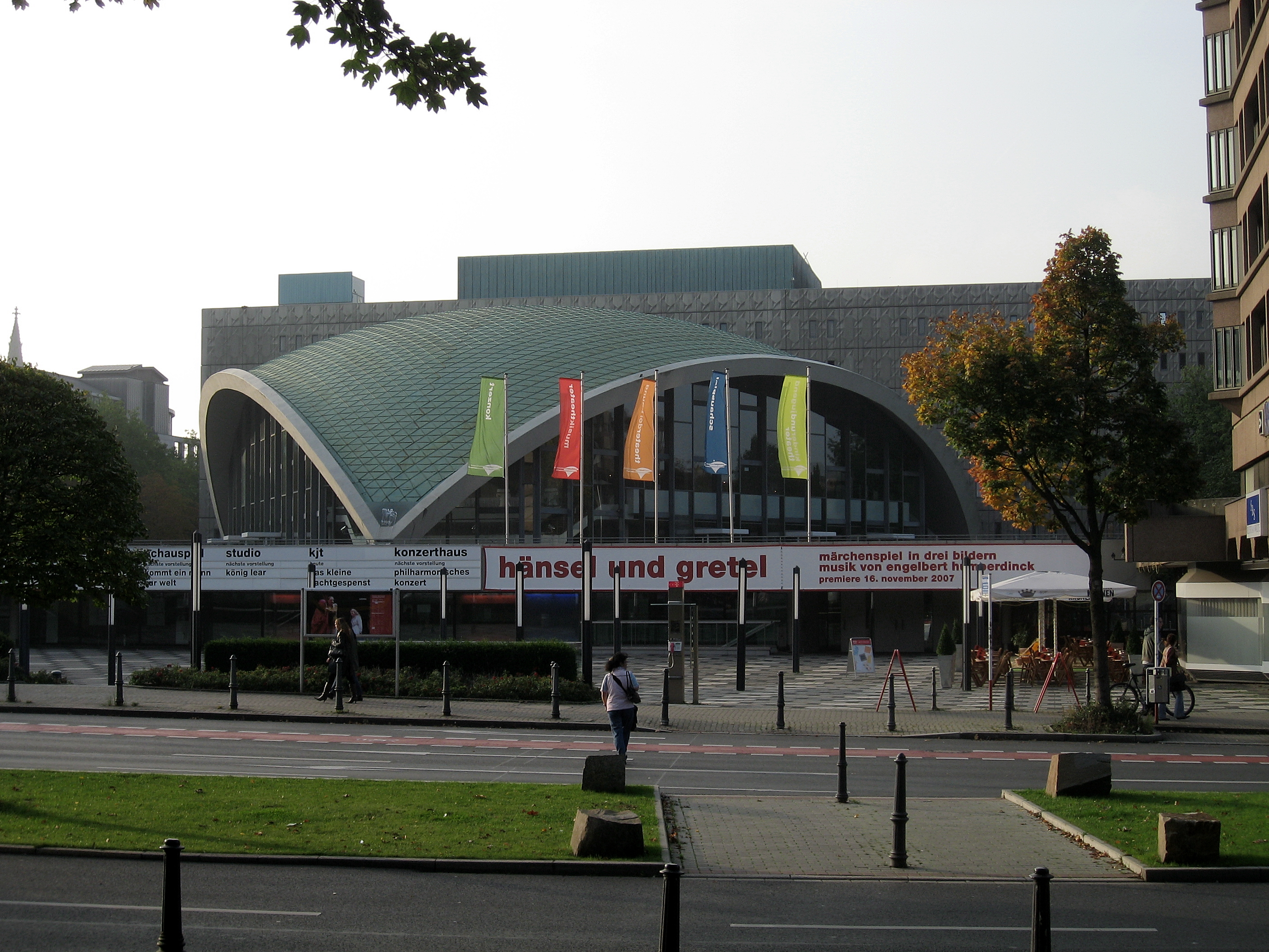 Dortmund, Städtische Bühnen, Stadttheater, Oper